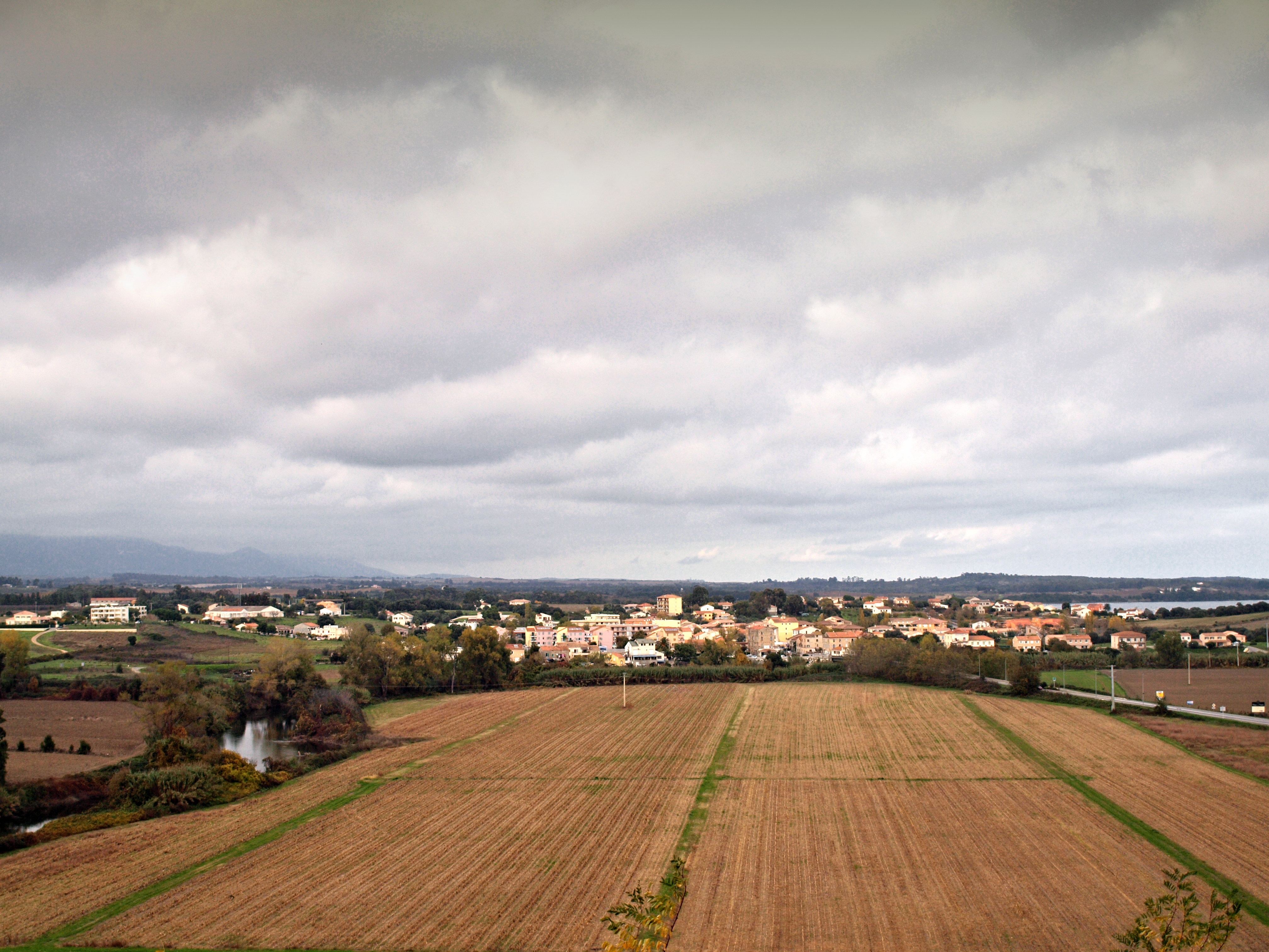 Aléria (Corsica) - Vue du Caterragio, avec le Tavignano et l'étang de diana, depuis le fort